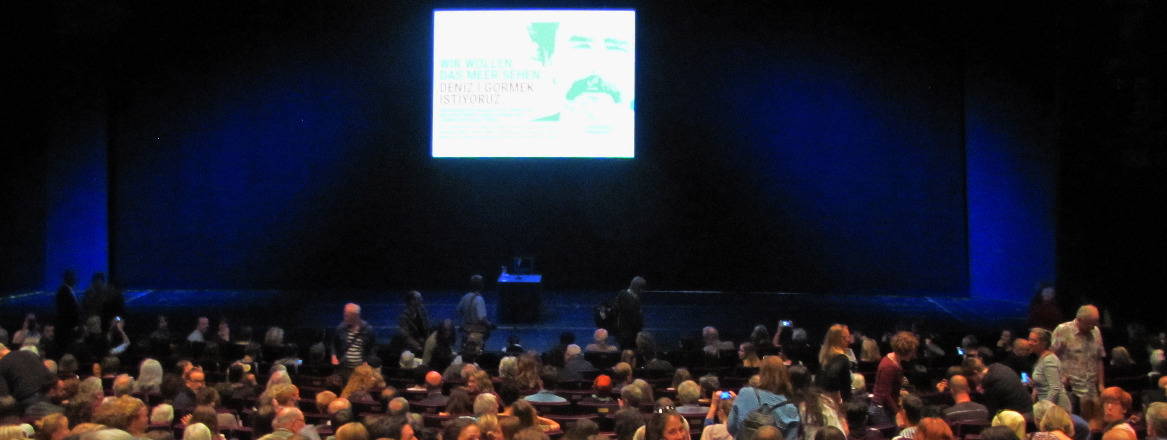 Am 21. Mai 2017, Saal und Bühne des Schauspiel Frankfurt bei der Solidaritäts-Matinee für Deniz Yücel und inhaftierte Journalistinnen und Journalisten in der Türkei.